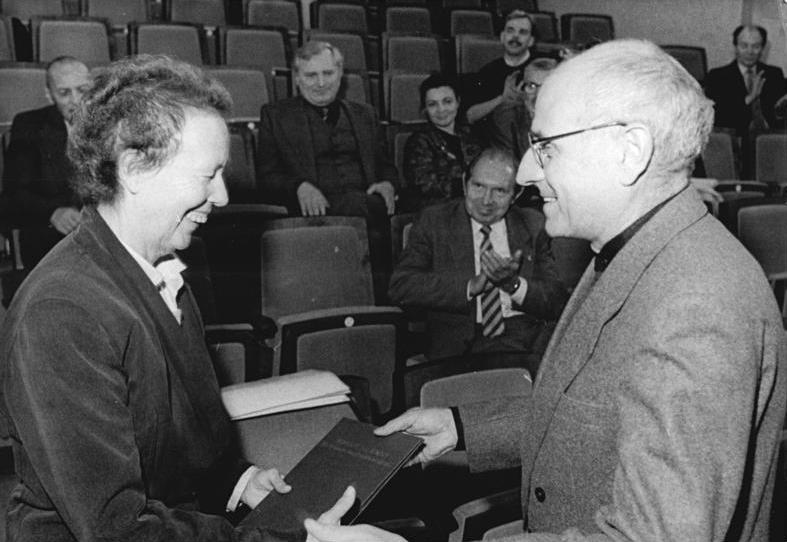 ADN-ZB Senft 20.10.88 Berlin: Preisverleihung Der Konrad-Wolf-Preis 1988 der Akademie der Künste der DDR wurde der Regisseur Prof. Ruth Berghaus (Deutsche Staatsoper Berlin) verliehen. Akademiepräsident Prof. Dr. Manfred Wekwerth überreicht die Auszeichnung.